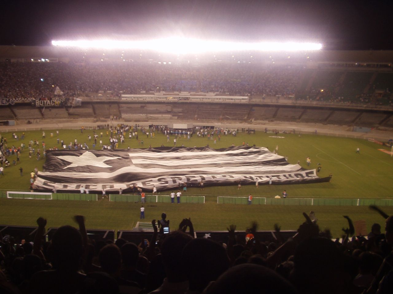 Na final do Carioca de 2006, Botafogo x Madureira.